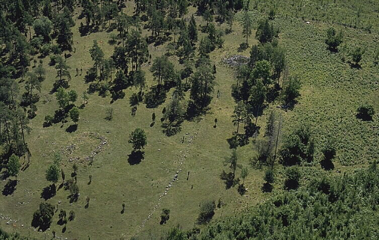 Husgrunder, hägnader och gravar. Motiv: Fallet Nyckelord: Flygbilder, Riksintressen Kategori: Fossil åker Husgrunder, hägnader och gravar.